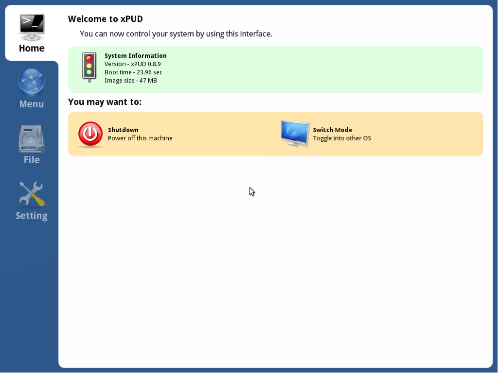 Premier écrans après démarrage sur le CD